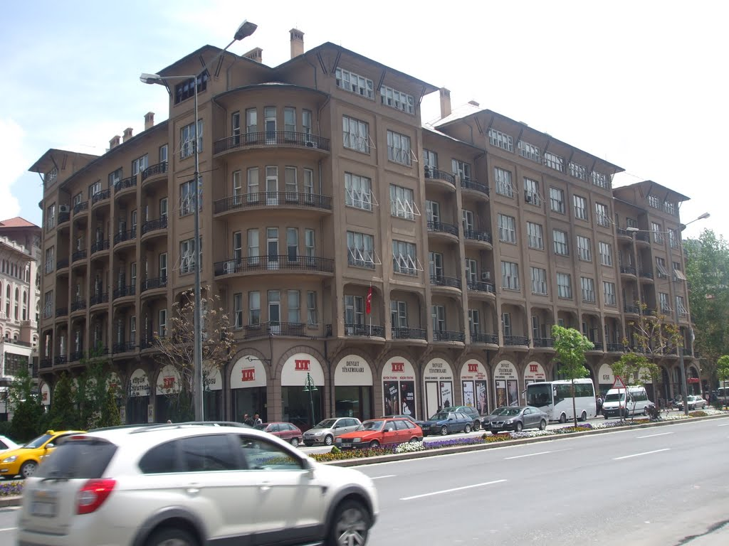 Ulus Opera binası, Ankara 2011.